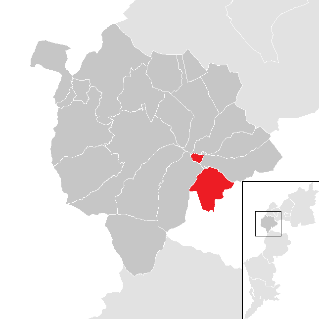 Bezirk Mattersburg